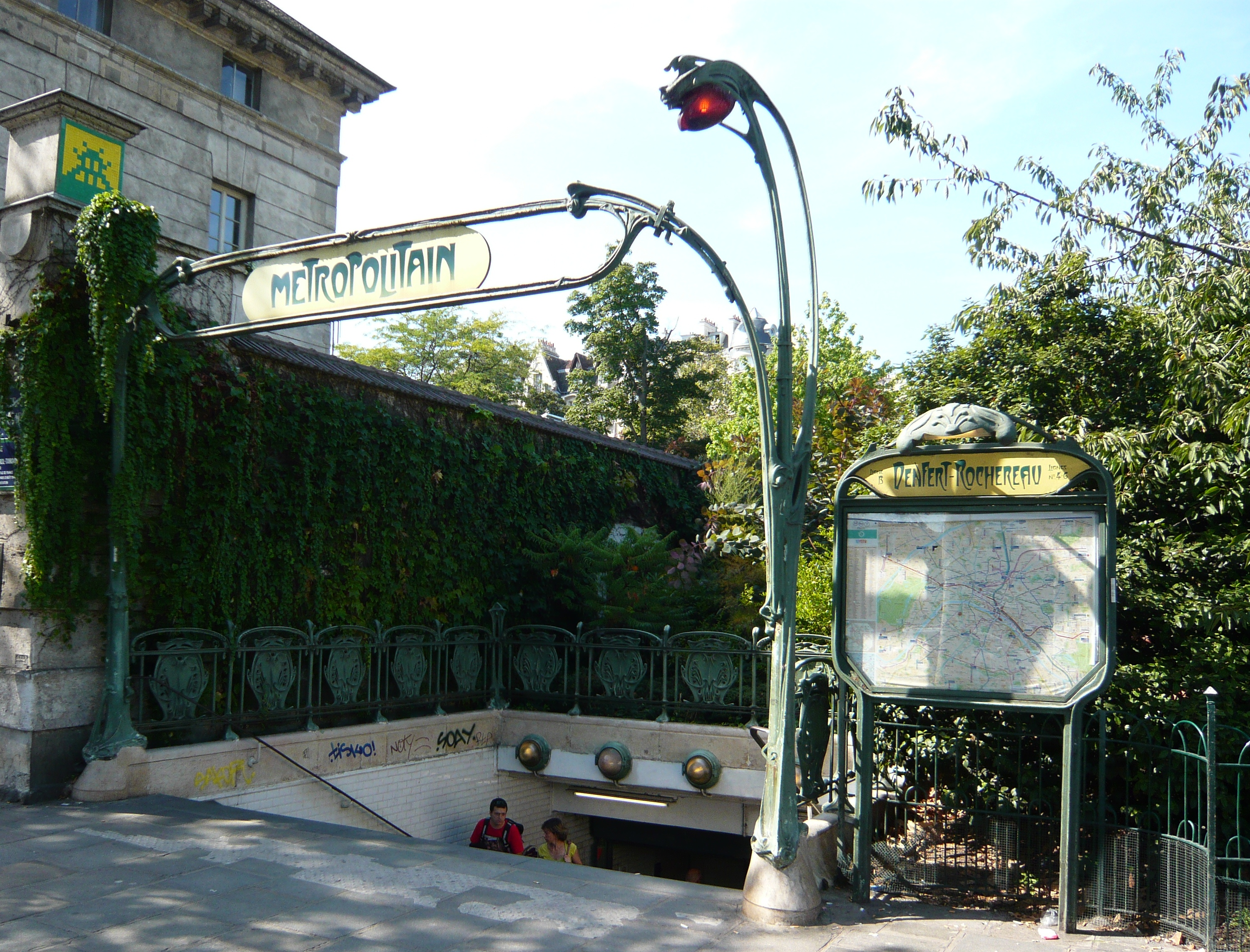 Edicule Guimard Métro Denfert-Rochereau